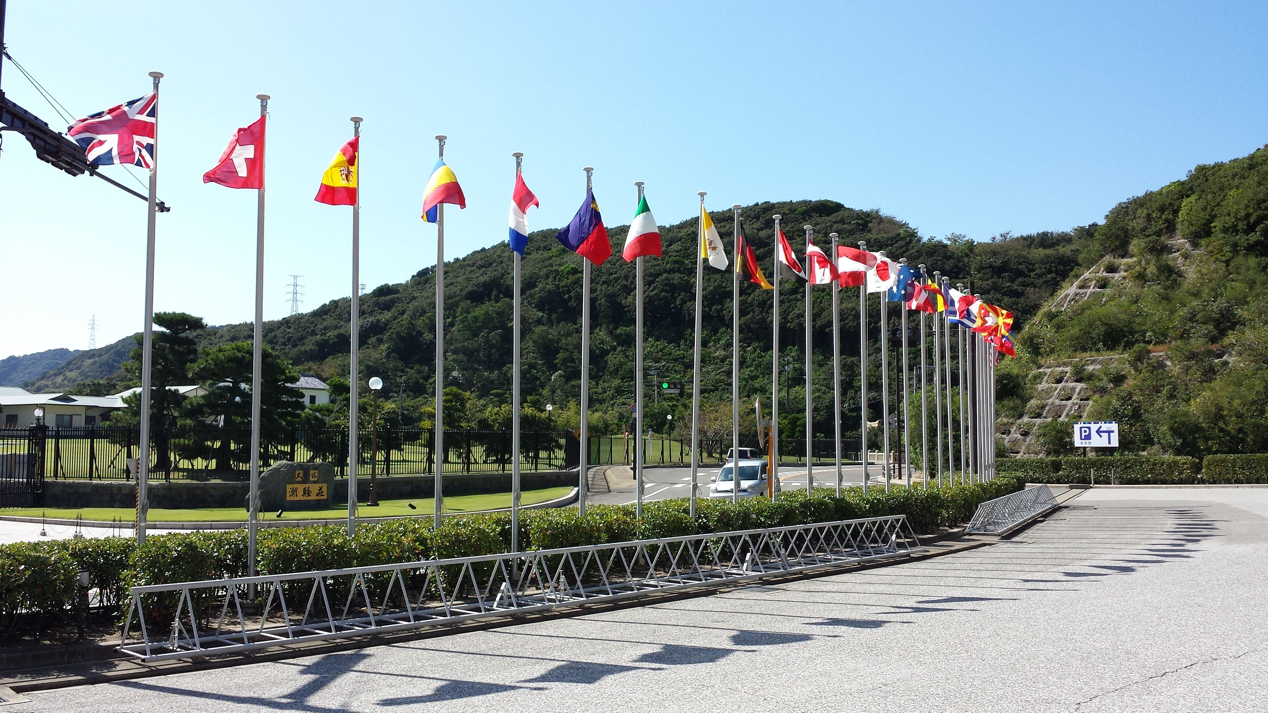 大塚国際美術館 正面広場